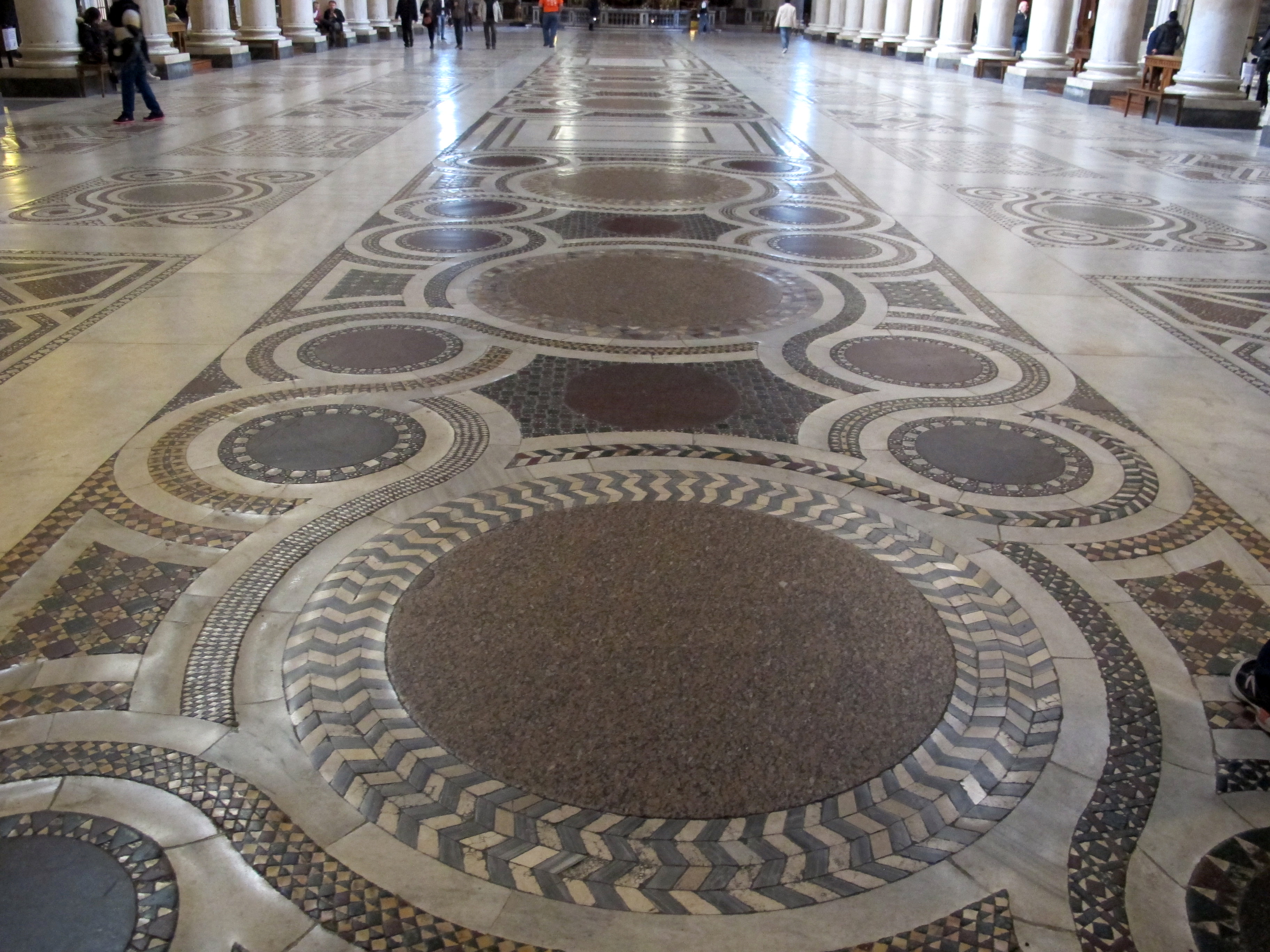 Santa Maria Maggiore (Roma)